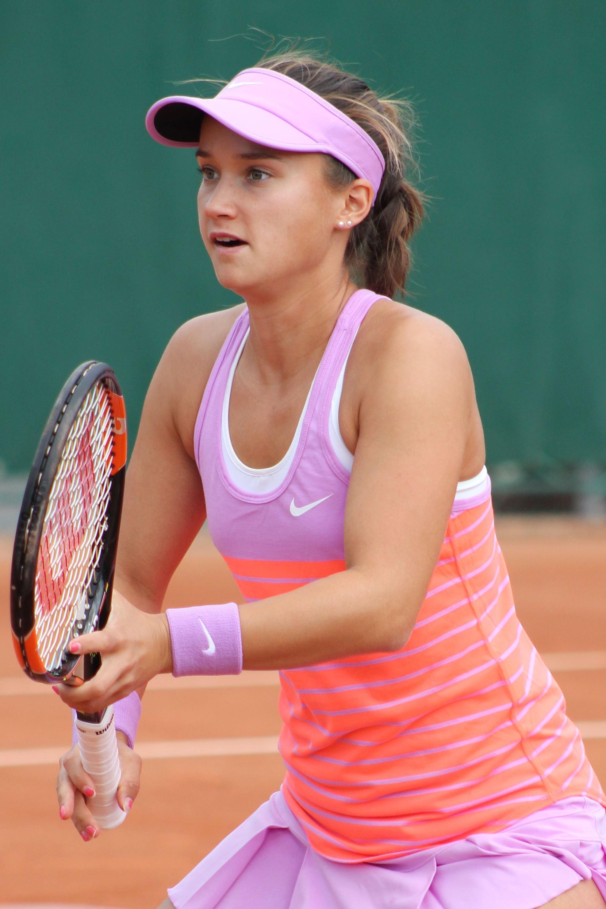 Davis RG15 (11)